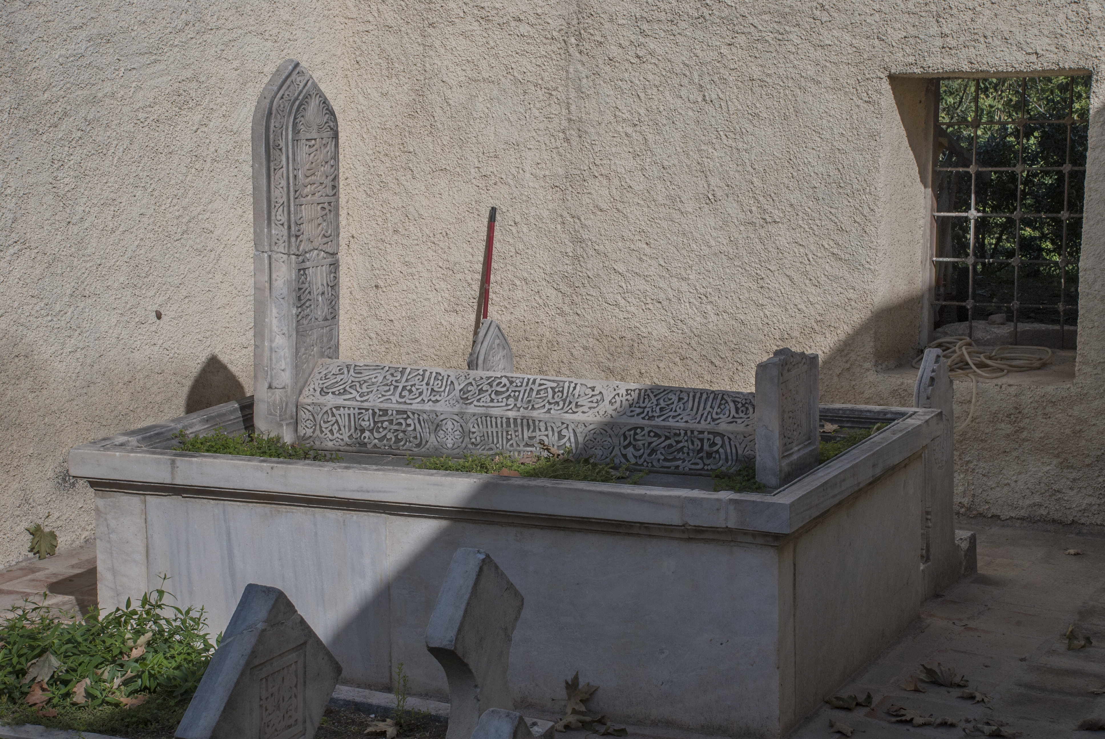 Sadrazam Çandarlı Halil Paşa'nın İznik'teki mezarı